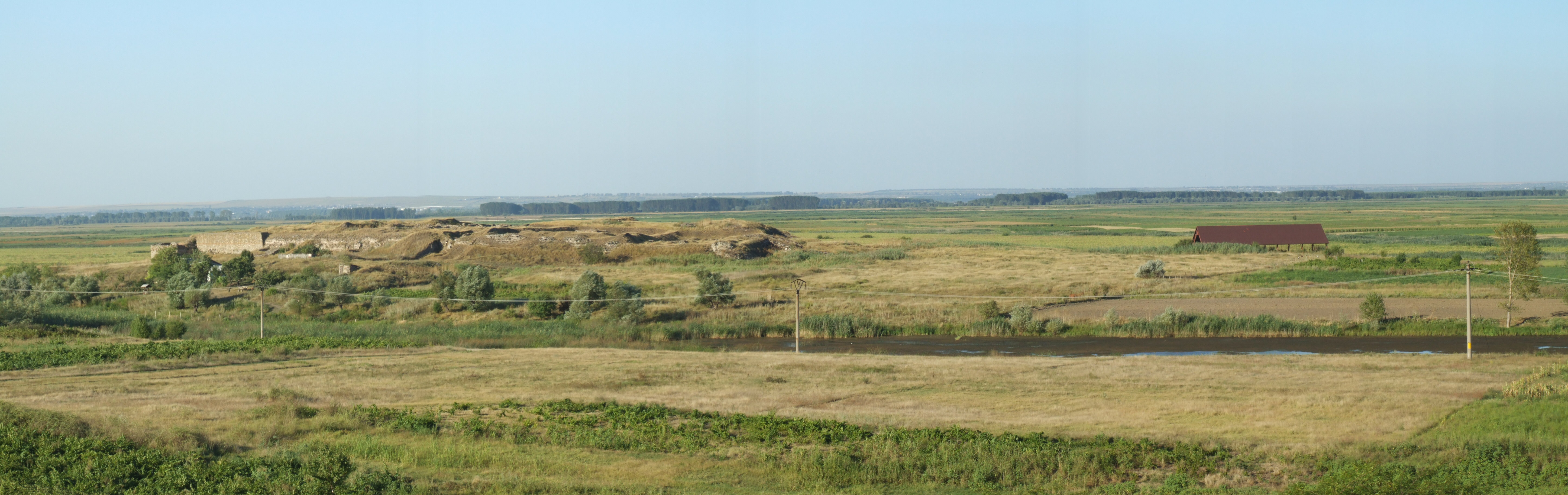 Blick auf das spätantike moesische Limeskastell Dinogetia südöstlich der Donaustadt Galatz. Unter dem Ziegeldach rechts befindet sich das Kastellbad.